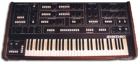 sintetizzatore Elka Synthex Licensing Categoria:Sintetizzatori